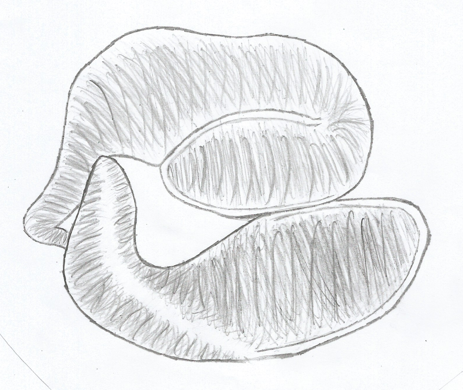 Duas sanguessuga Hirudinaria sp. (Arhynchobdellida) em cópula.